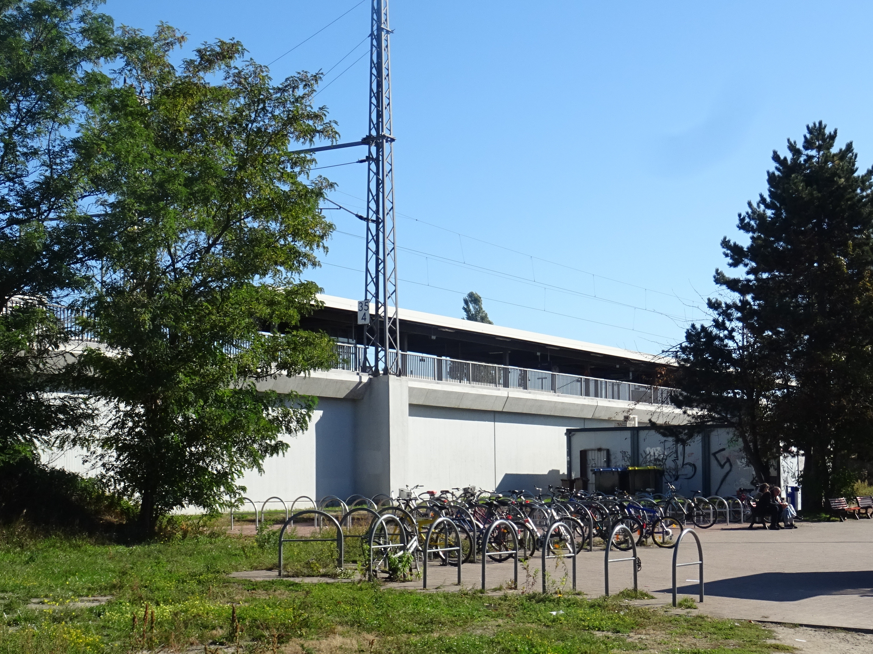 Bahnhof Nauen, Zugang auf der Südseite mit Blick auf das Bahnsteigdach